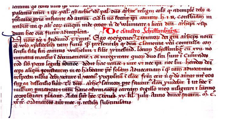 Kopie aus dem 14. Jahrhundert, Gründungsurkunde (1129) von Kloster Schiffenberg, Landkreis Gießen, Hessen, Deutschland